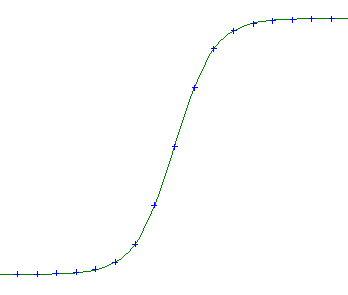 La courbe d'une fonction sigmoide.